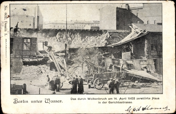 Beim Unwetter in Berlin am 14. April 1902 zerstörtes Haus.